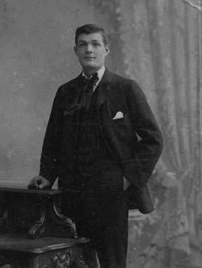 Acteur Jan Lemaire sr. op 19-jarige leeftijd